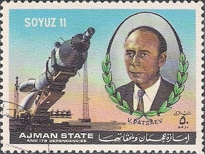 Viktor Patsayev